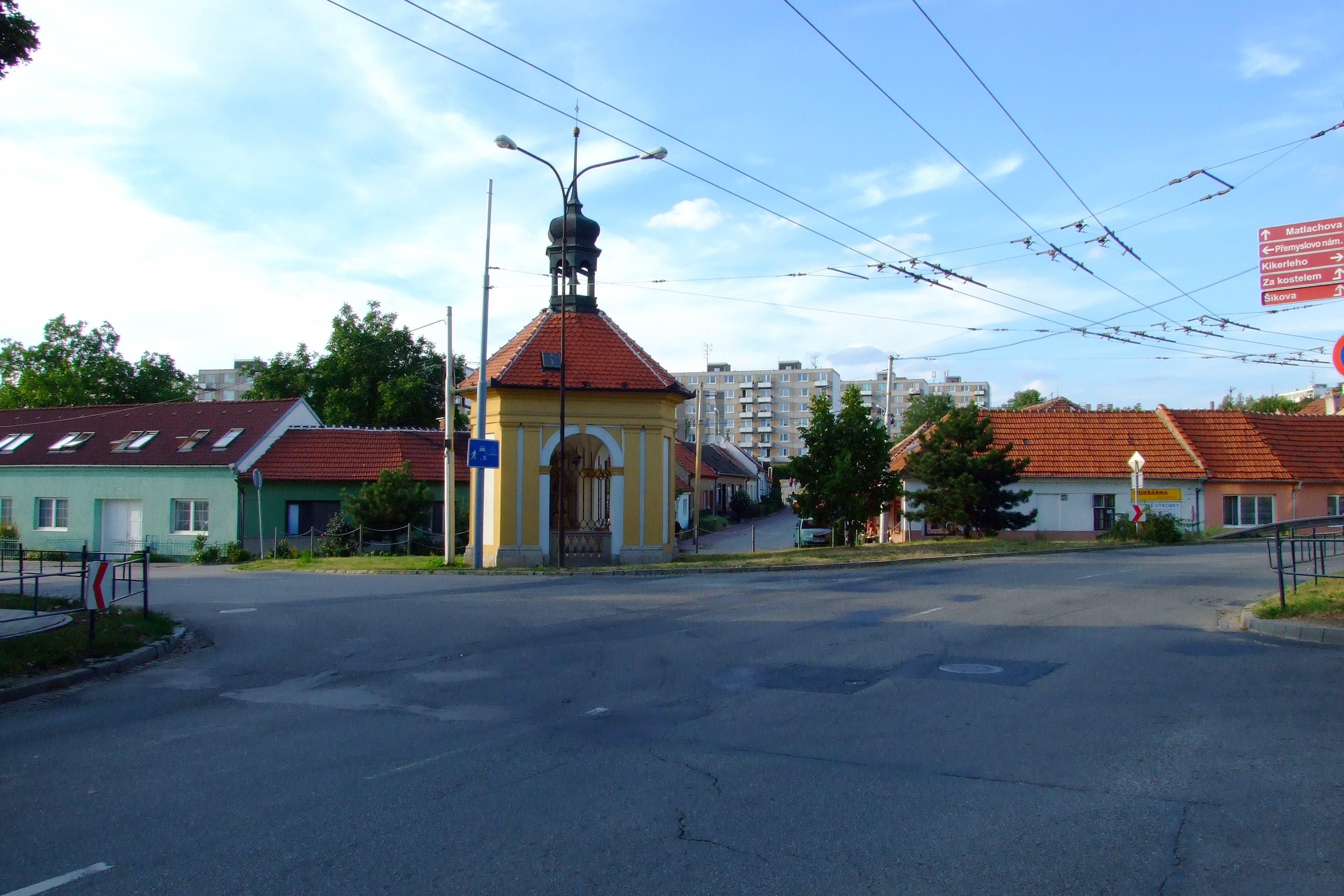 Brno-Slatina - pohled na sever z křižovatky ulic Tuřanka a Kikrleho